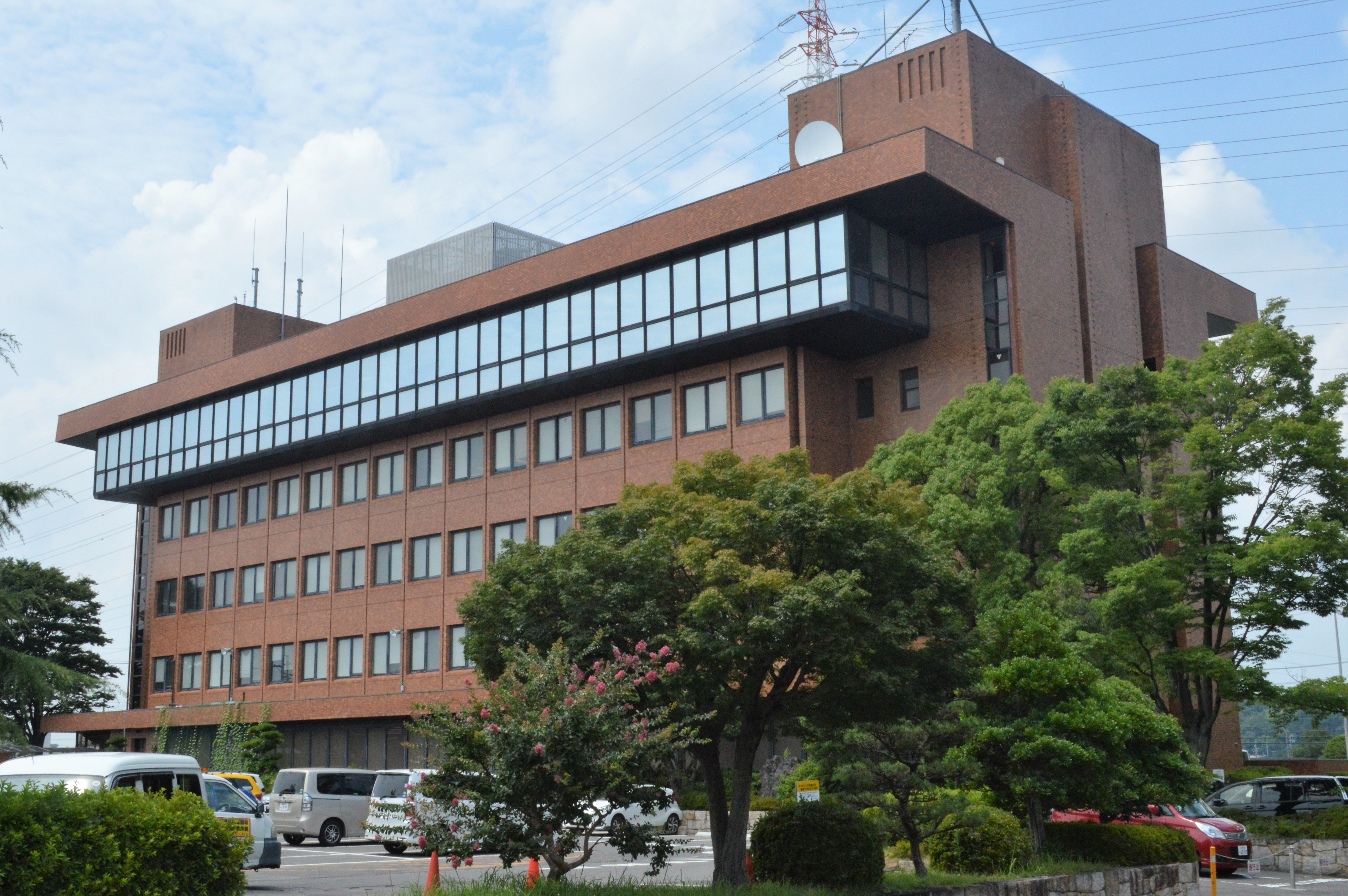 愛知県日進市の日進市役所。